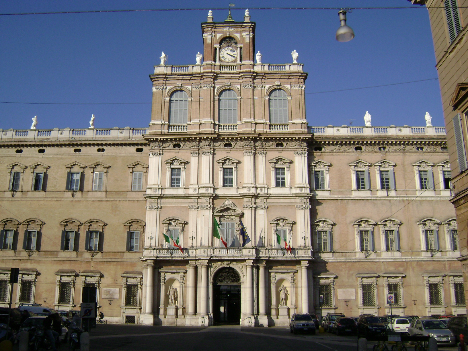 Palazzo Ducale, Modena